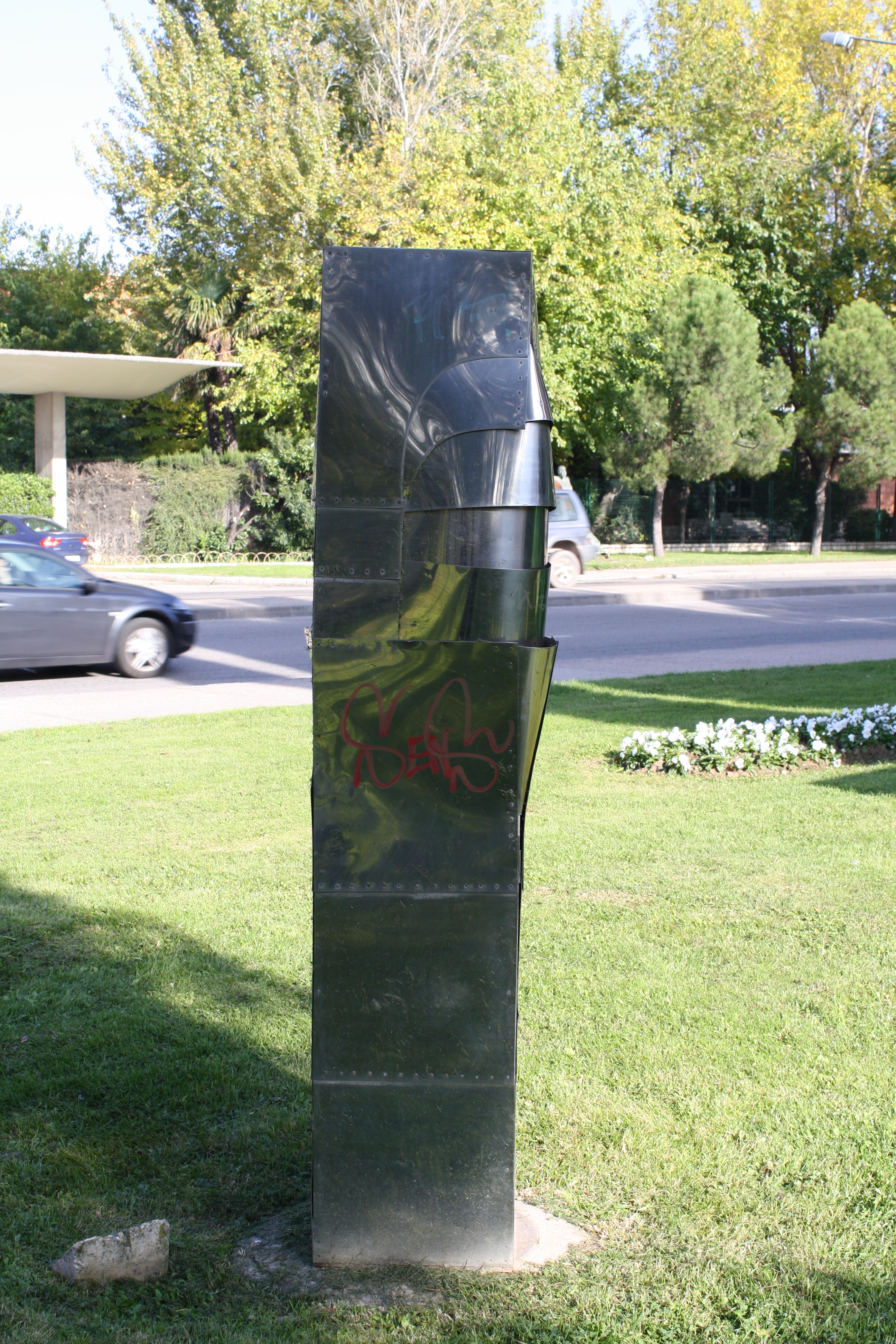 Museo de escultura al aire libre de Alcalá de Henares (Comunidad de Madrid - España). Escultor: Amadeo Gabino.